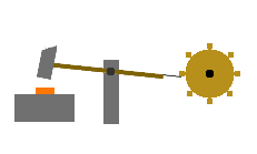 Schematekening nokkenschijf hamersmidse. Eigen brouwsel.